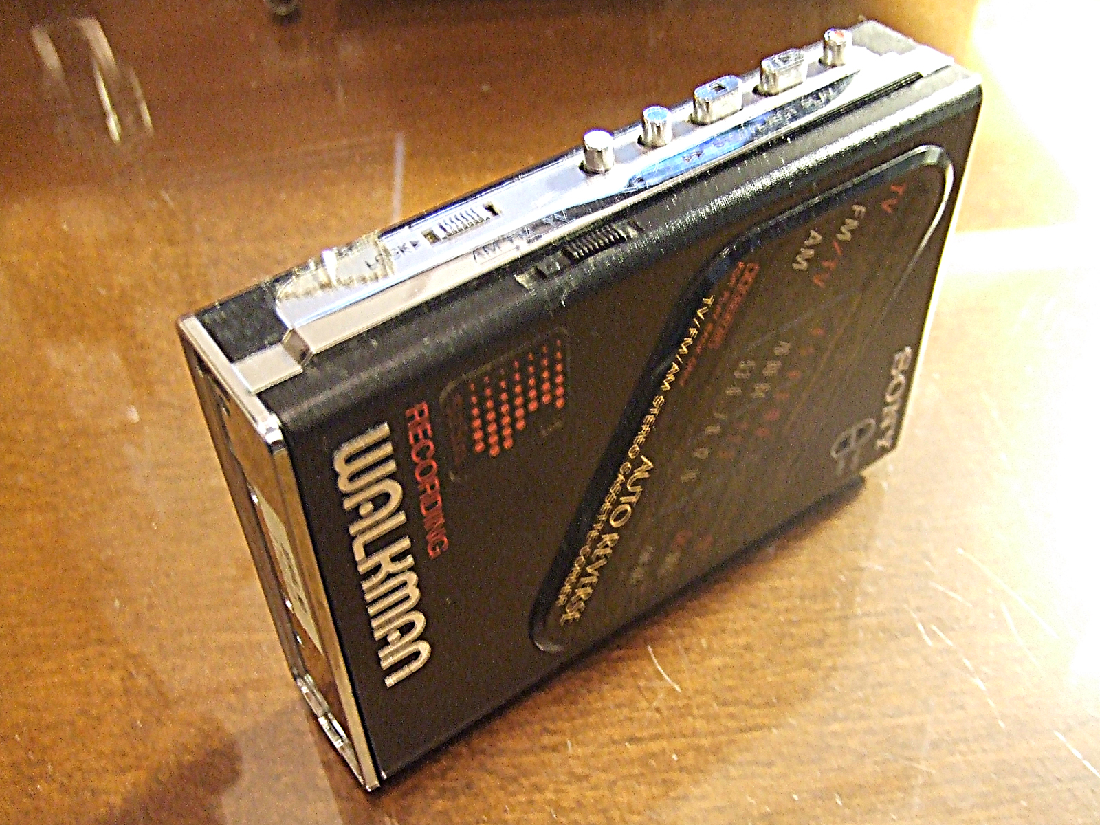 ソニー ウォークマン F203